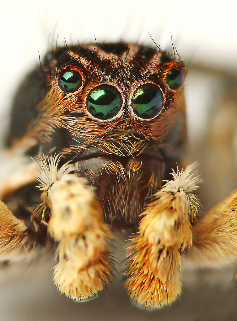 Jumping spider - Aelurillus v-insignitus